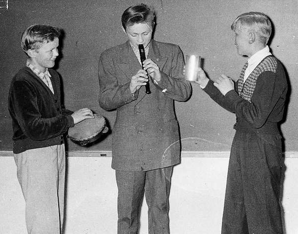 Muusikot Jukka Kuoppamäki (keskellä) ja Mikko Kuoppamäki (vasemmalla) sekä heidän serkkunsa Martti noin vuonna 1955.